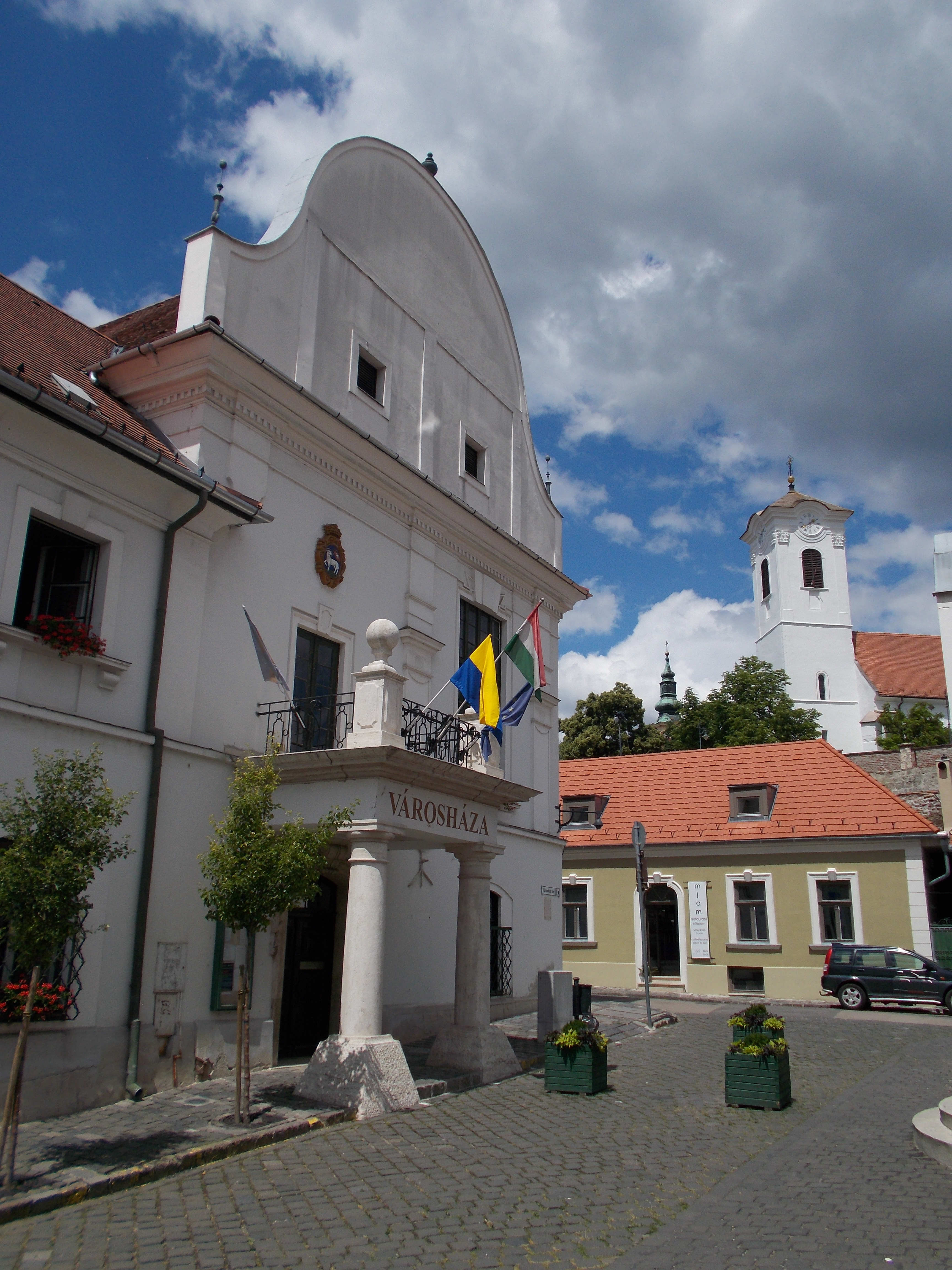 Városháza Műemlék ID 7402 Barokk, 1730 körül. Bővítve a 19. sz.-ban. Mai alakjában átalakítva 1924-ben. A háttérben a Keresztelő Szent János Katolikus plébániatemplom Műemlék ID 7400 -Szentendre kerámiából készült, református jegyeket hordozó címere a városháza homlokzatán. A címer részletes leírása: Szentendre több évszázados keresztény hagyományát szimbolizálja. Ovális alakú címerpajzsban, zöld dombon kék háttér előtt fehér, balra hátrafelé tekintő bárány áll. Jobb mellső lábával kereszt végződésű zászlónyelet tart, melyen vörös színű lobogó függ, középen fehér színű, egyenlő szárú kereszttel. - A bárány fejét arany (sárga) színű glória övezi, dicsfénykör látható. Ugyancsak arany (sárga) színű a címerpajzsot körülvevő barokk keretdísz, melynek tetején leveles korona áll. Forrás és még több: - Szentendre, Városház tér 3